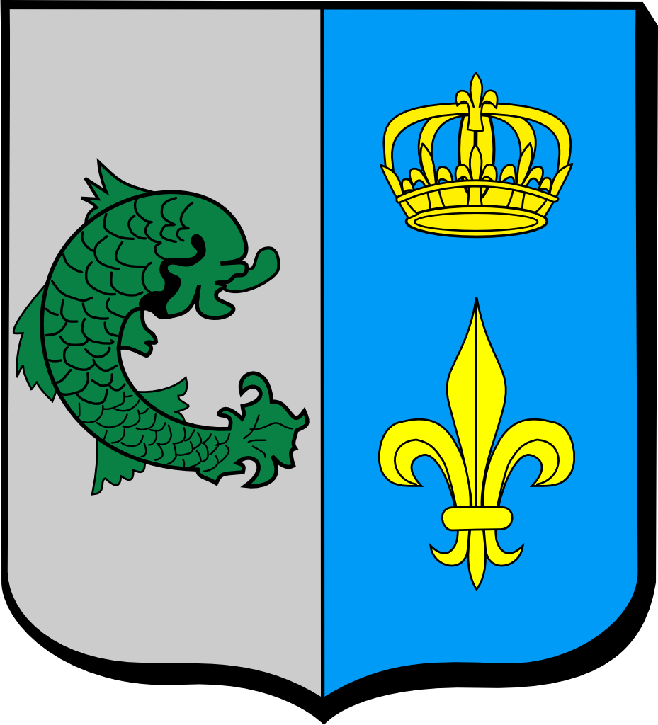 Blason de la commune de Mollans-sur-Ouvèze